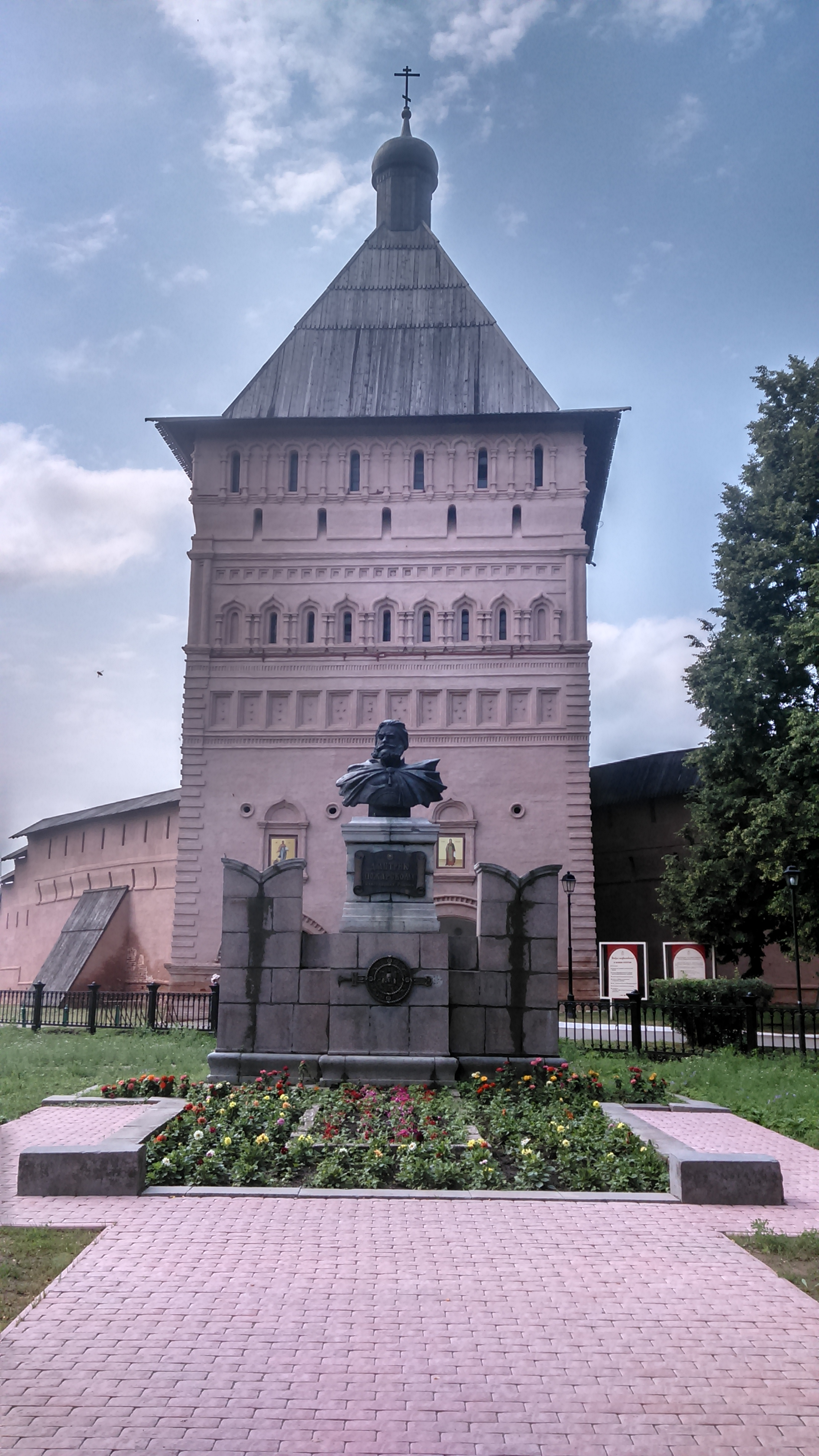 Бюст Д. М. Пожарского перед входом в монастырь. Спасо-Евфимиев монастырь, Суздаль